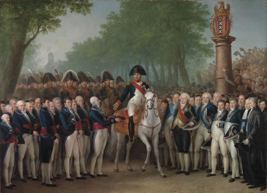 schilderij; Linnaeusstraat; geschiedenis Amsterdam; Linnaeusstraat; Bonaparte, Napoleon; D'Alphonse, Baron; Chassedeloup; Brienen, Willem Joseph van; Brouwer Joachimsz., Jan; Brun, Jan le; Changuion, Daniel; Charlé, Petrus Paulus; Eijs, Jan Nicolaas van; Gales, H.J.; Gelder de Neufville, David Mattheus van; Gogel, Isaac J.A.; Hodshon, Jan; Huydecoper van Maarsseveen, Joan; Meijnts, Anthony; Molitor; Moncey, Maarschalk; Oudinot; Pelichy de Lichtevelde; Roustan; Sande, Gerrit van; Scholten van Oud-Haarlem, W.; Stuers, Joseph de; Vereul, Abraham; Verheijen, J.J.; Voombergh, Willem Hendrik